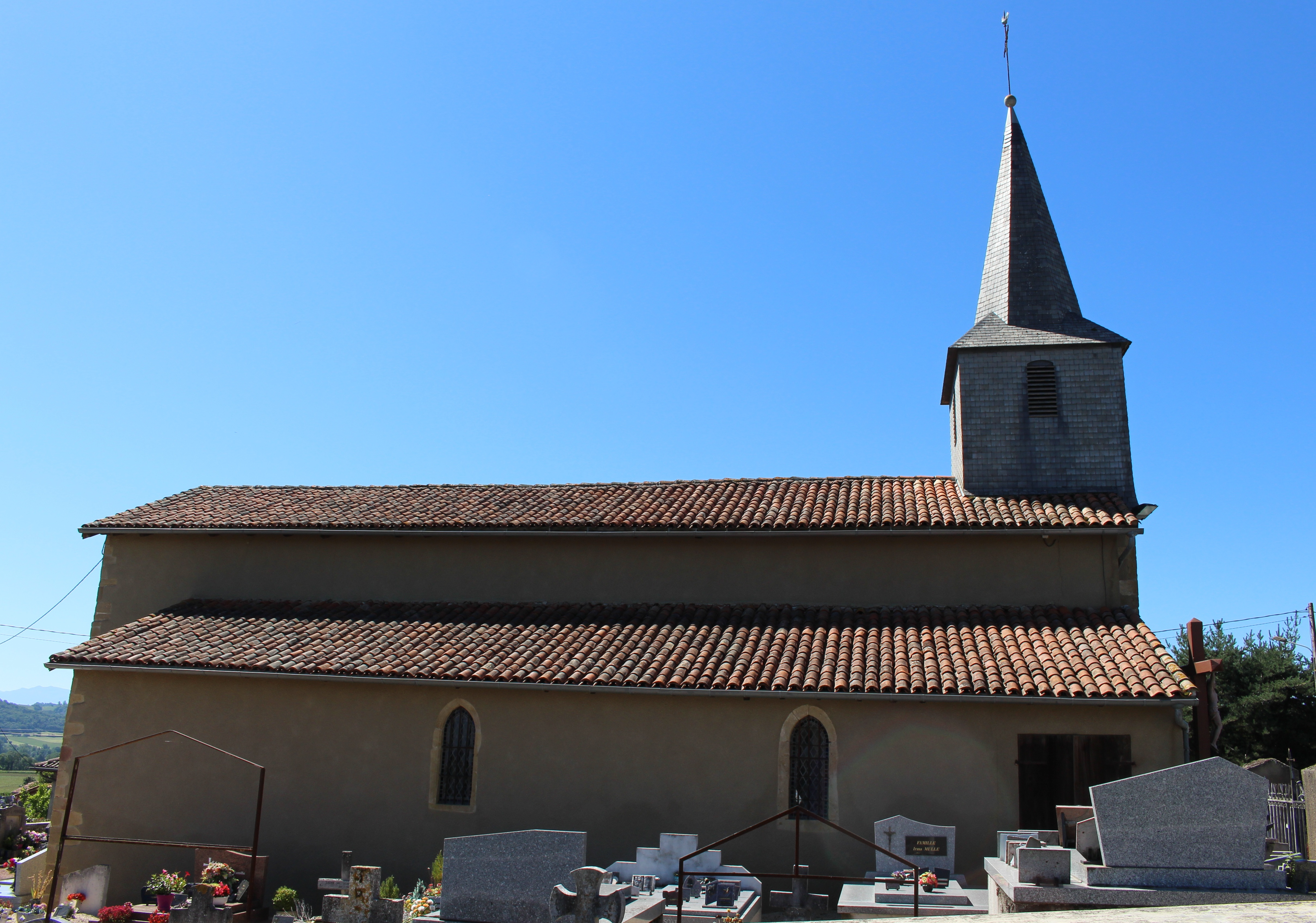 Église Saint-Germé de Cizos (Hautes-Pyrénées)